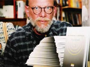 Foto de Jayro Schmidt